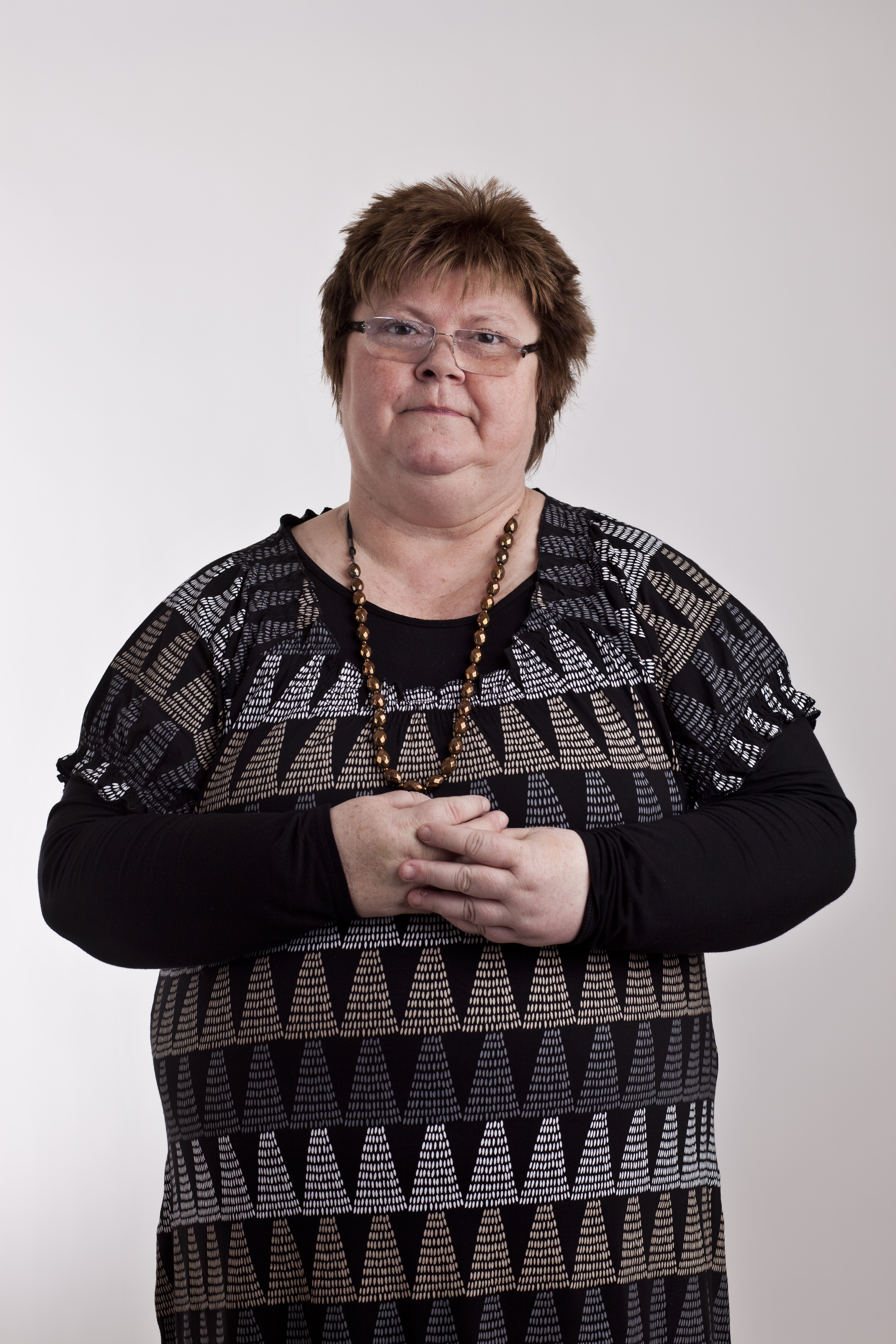 Anki Ahlsten, Vänsterpartiet.